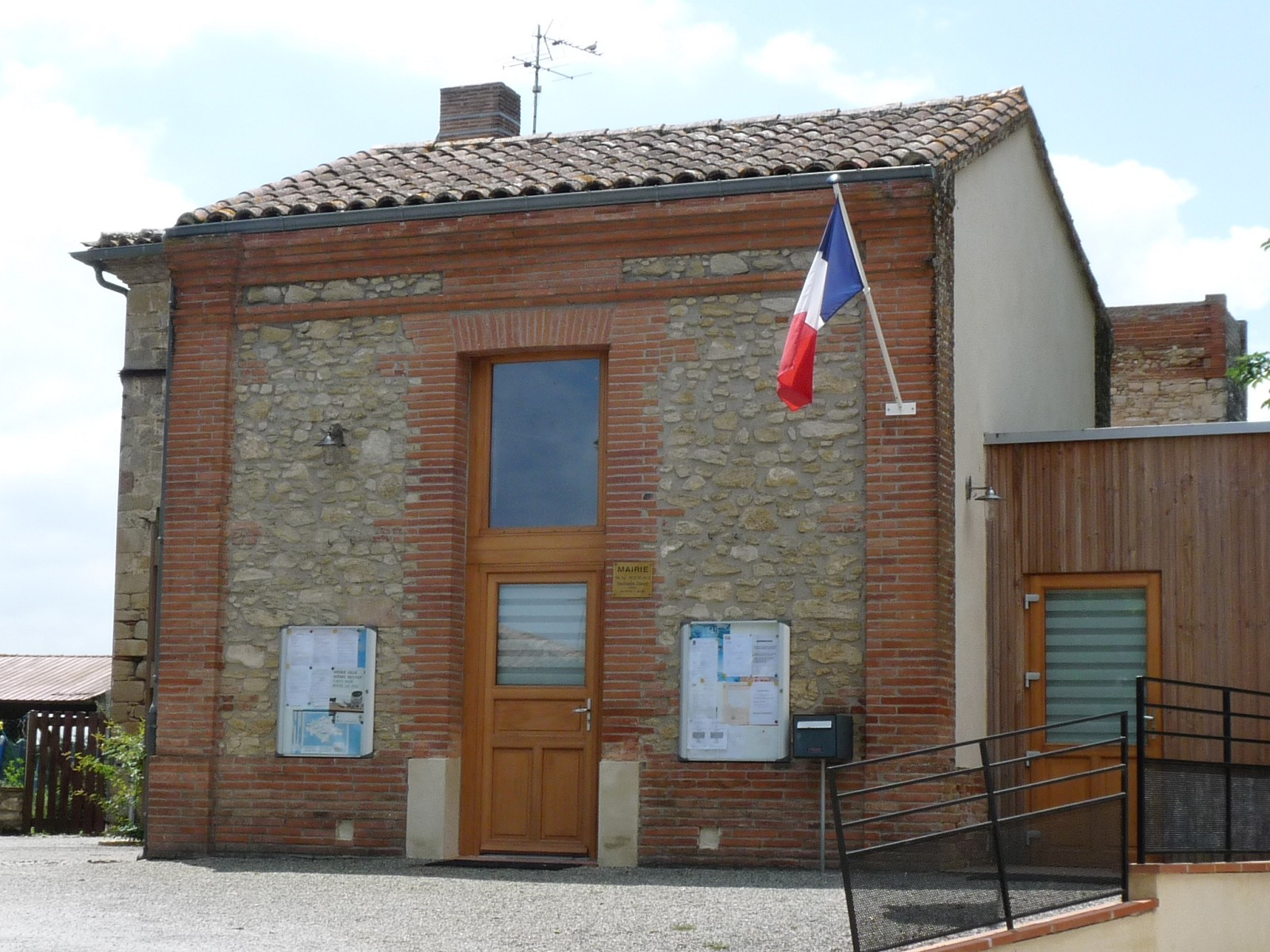 Mairie de La Salvetat-Lauragais, Haute-Garonne, France